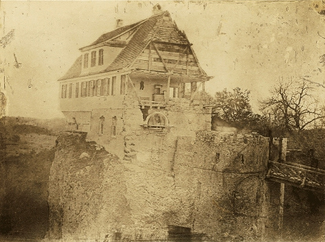 Abbruch des Forsthauses auf dem Lichtenstein, März bis Juli 1839